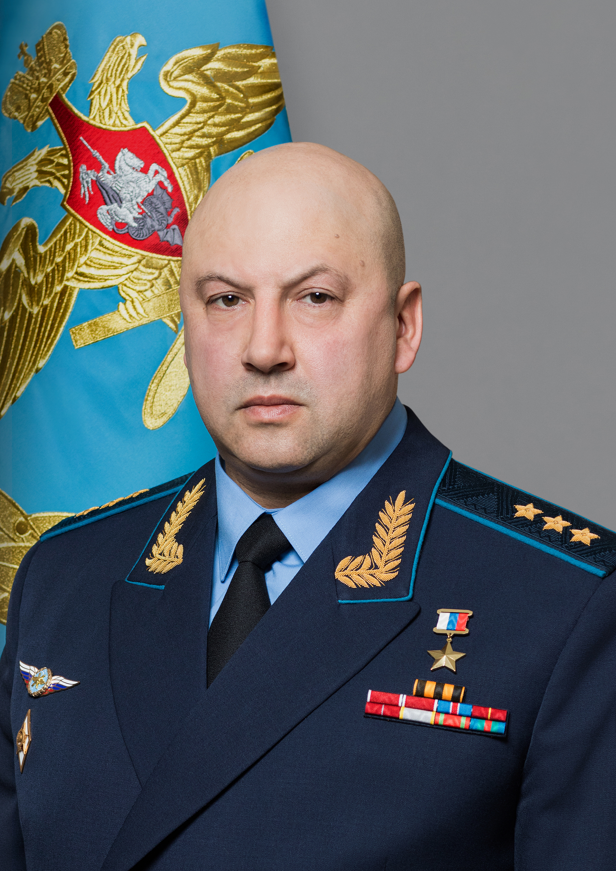 Главнокомандующий Воздушно-космическими силами Российской Федерации Герой Российской Федерации генерал-полковник Сергей Владимирович Суровикин